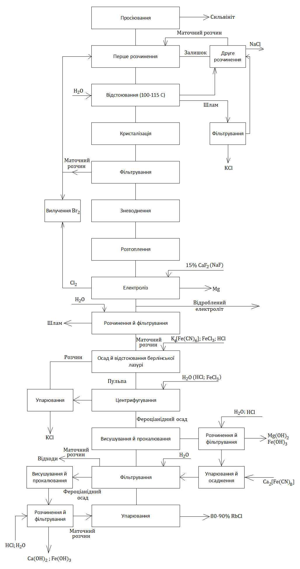 Опис